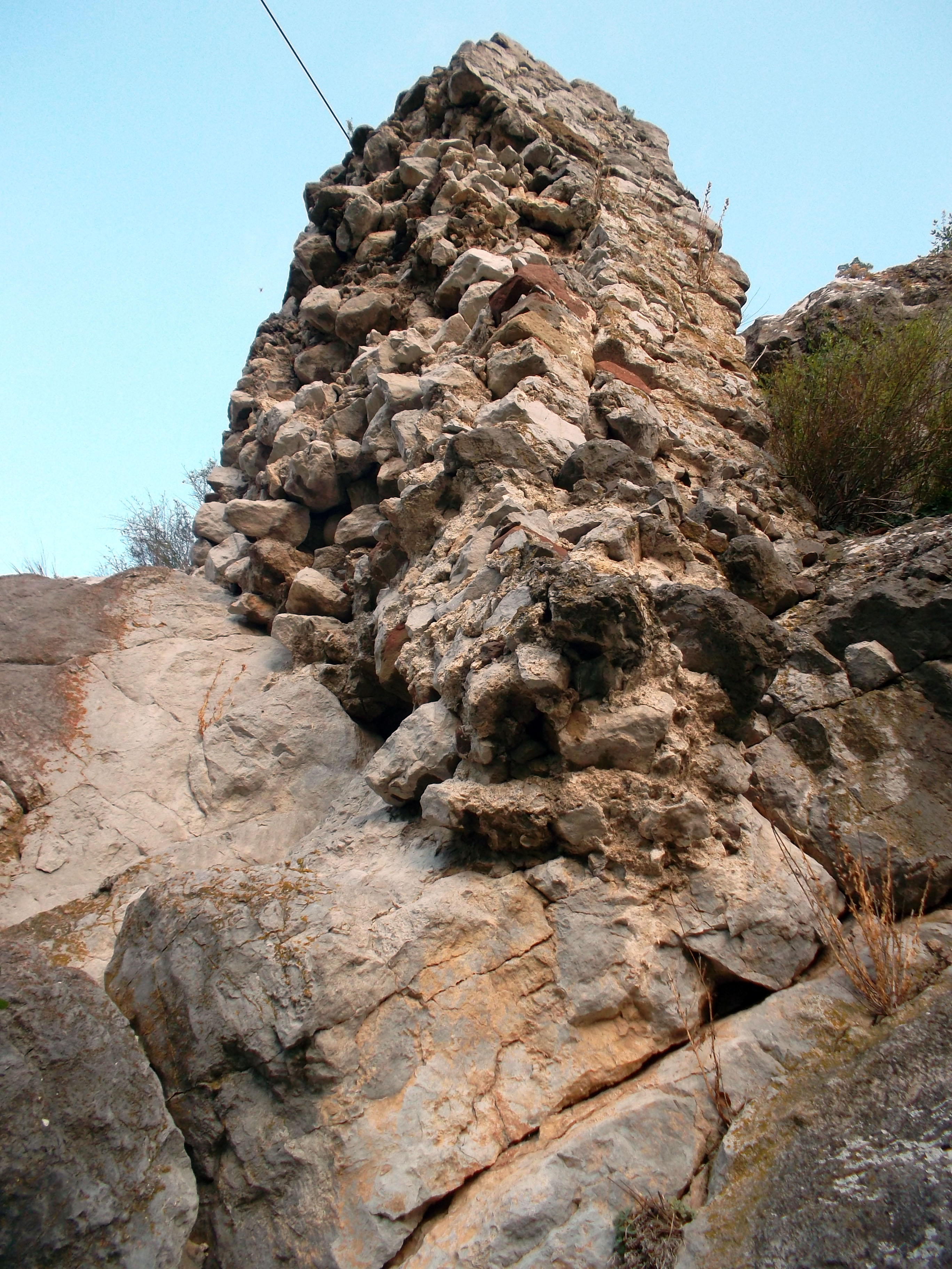 Рештки стіни фортеці в Гурзуфі